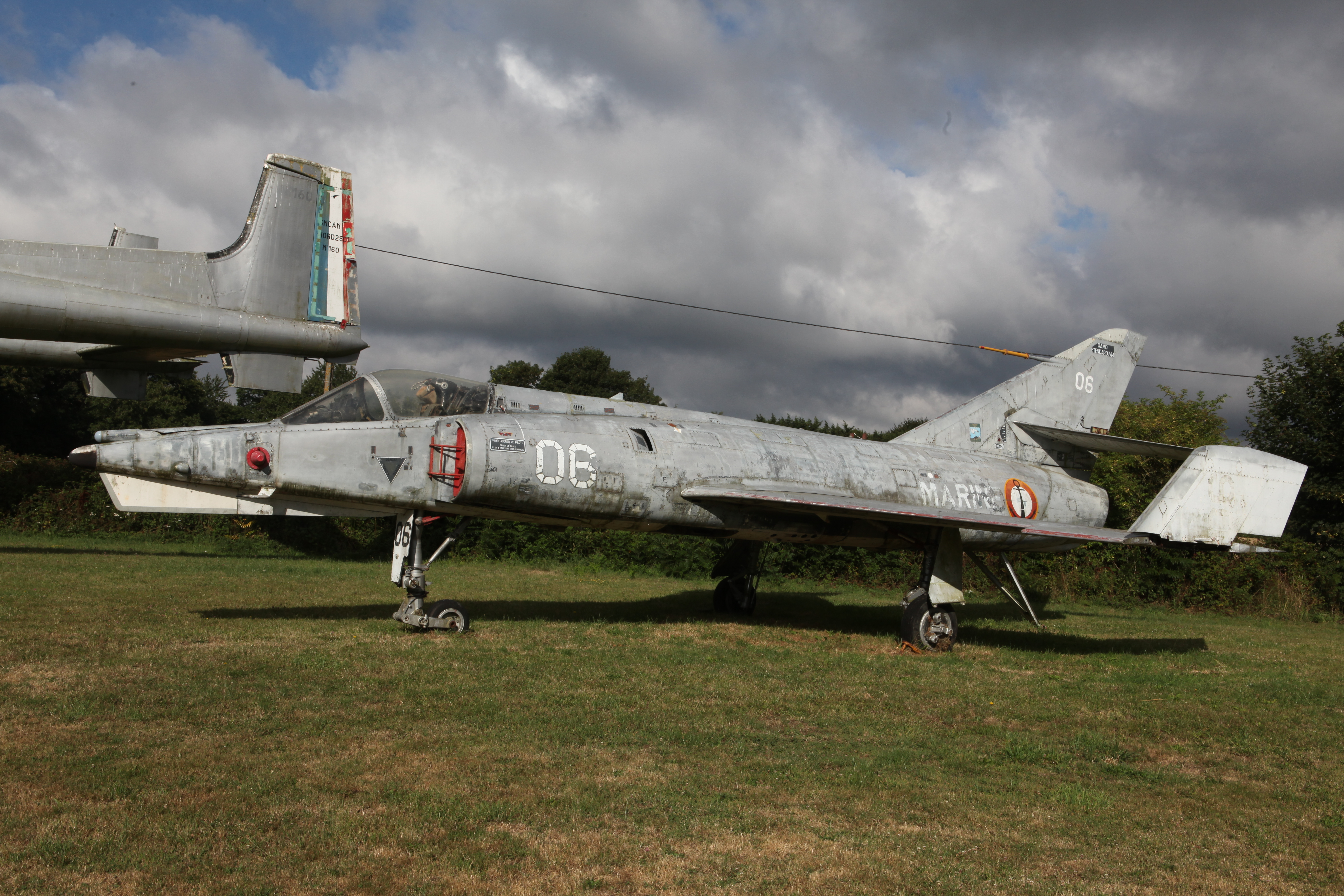 at Ailes Anciennes Armorique Vannes airport